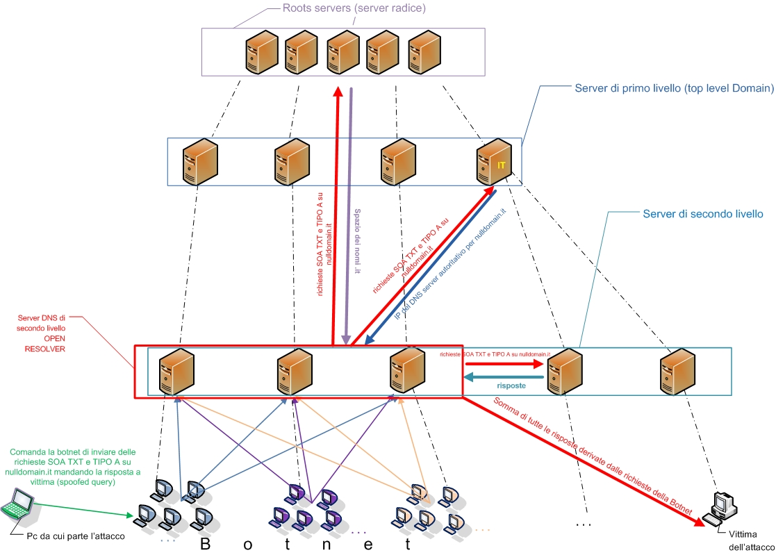 Marco Basile DNS Amplification Attack